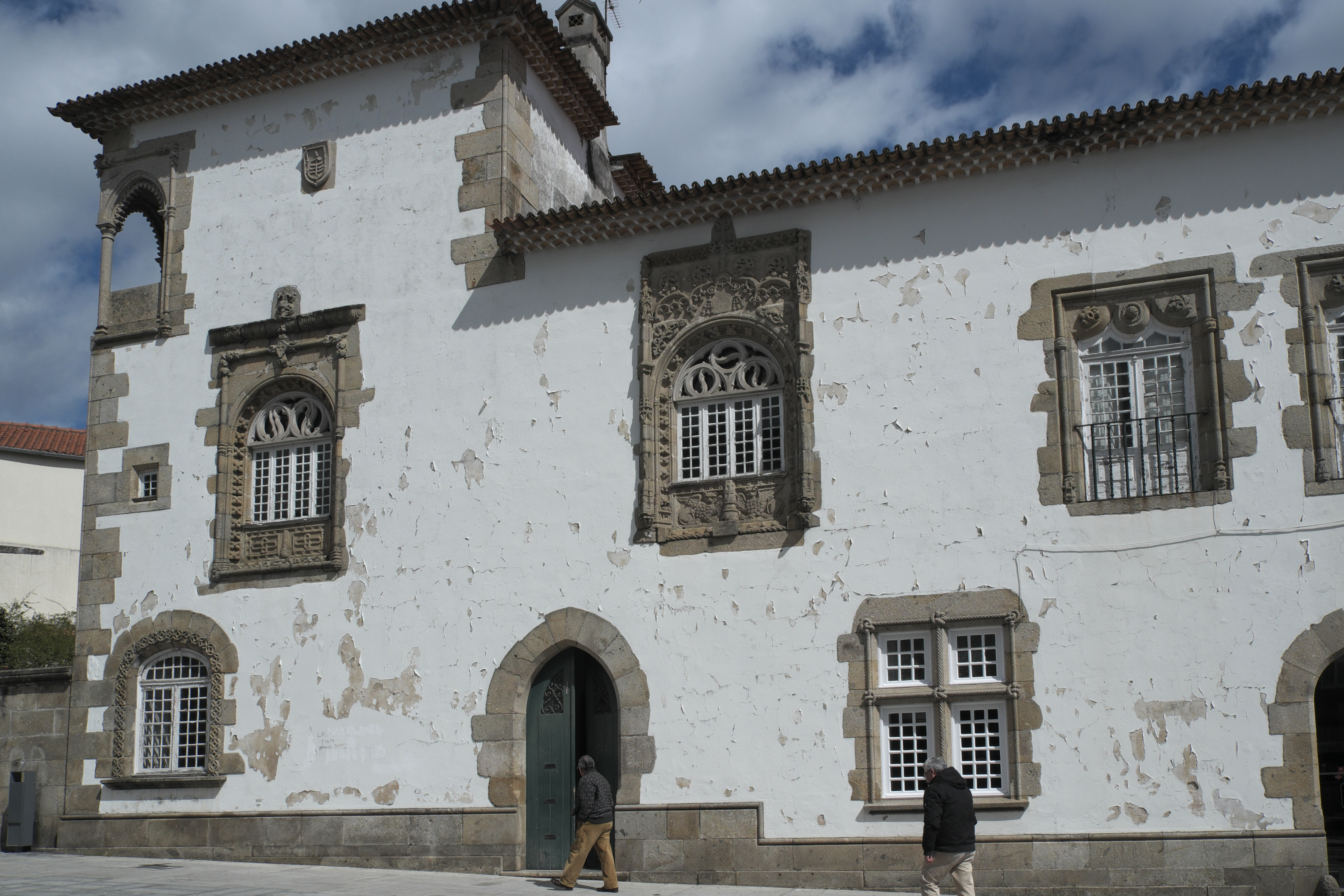 Gebäude in Braga (Portugal)